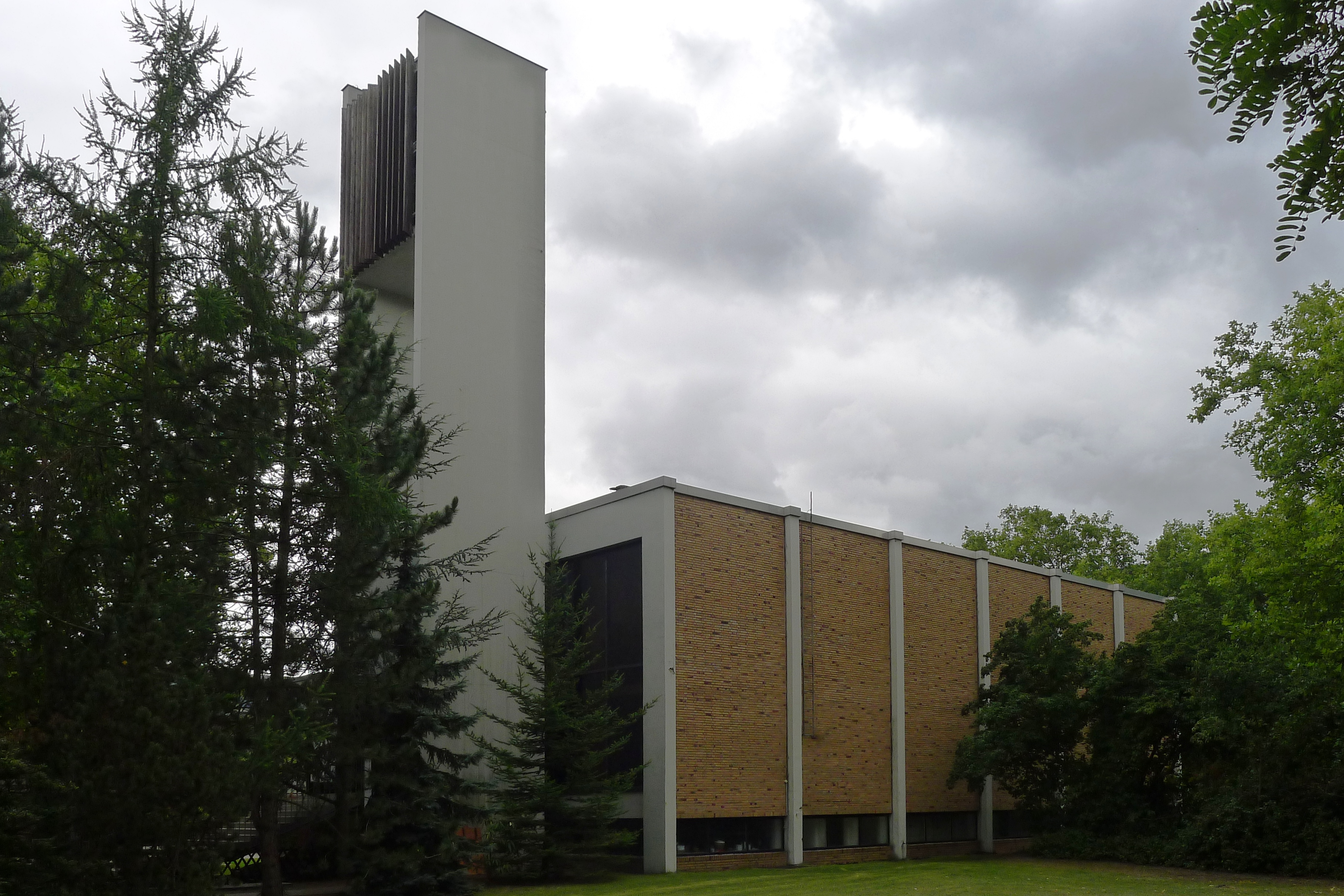 Schrägansicht auf Turm und Kirchenschiff